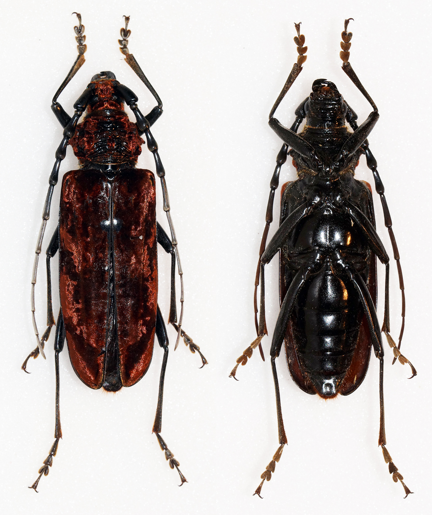 Fairmaire,1889 Sex: Female Data: 15-06-14 - Mt Dayaoshan - 1200m - Pingban - Guangxi - China Size: 50mm